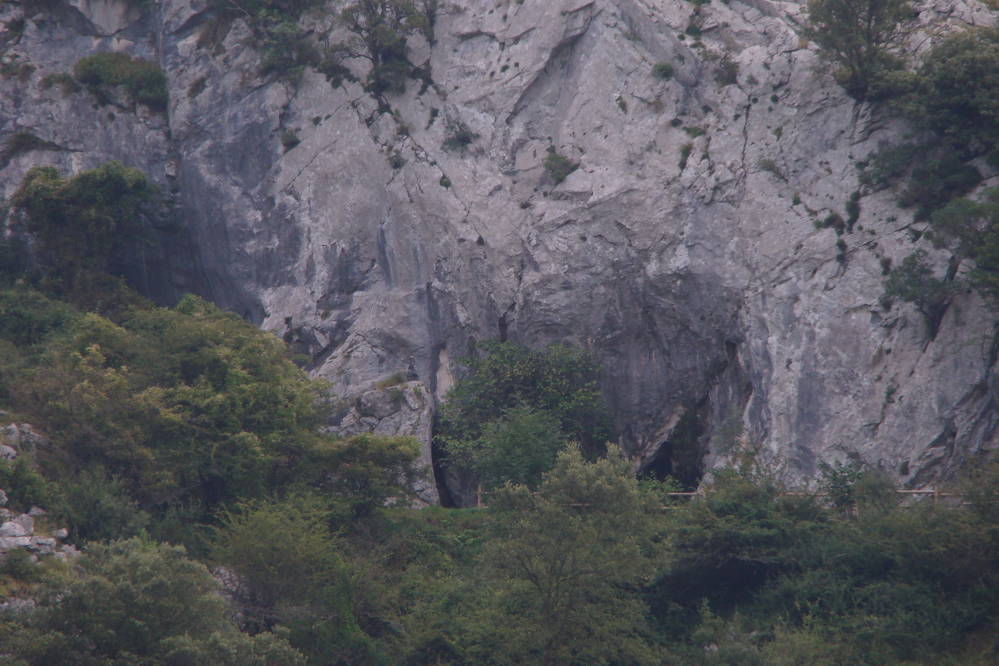 Situación de la cueva de Covalanas (Ramales de la Victoria)